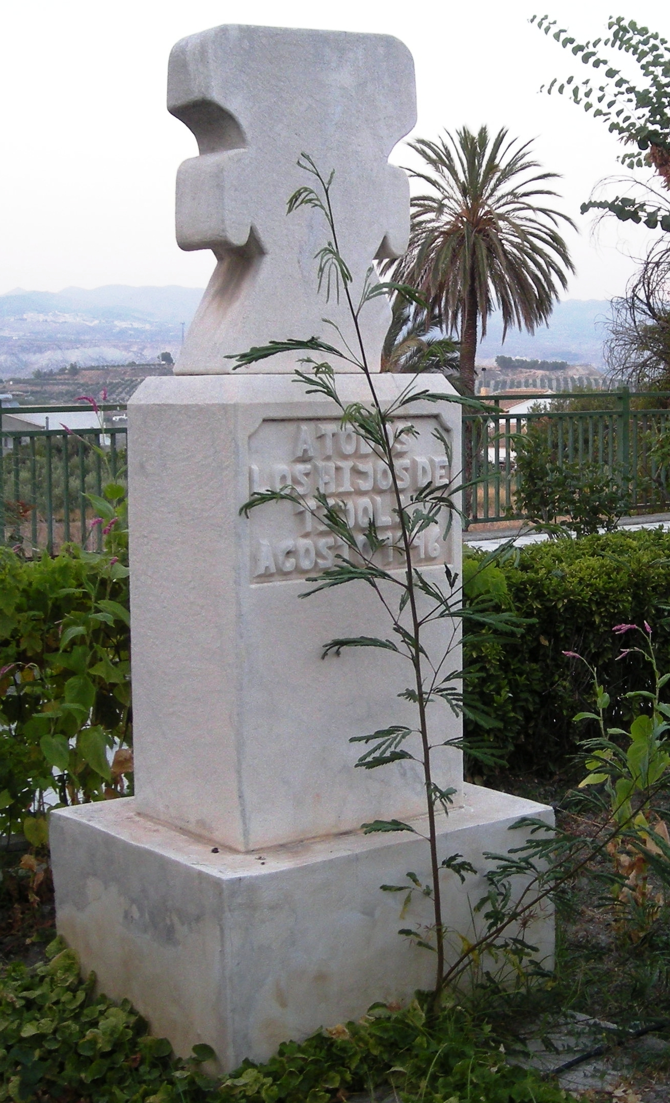 Idolo de Tíjola, una reproducción de mármol, más grande que el original.